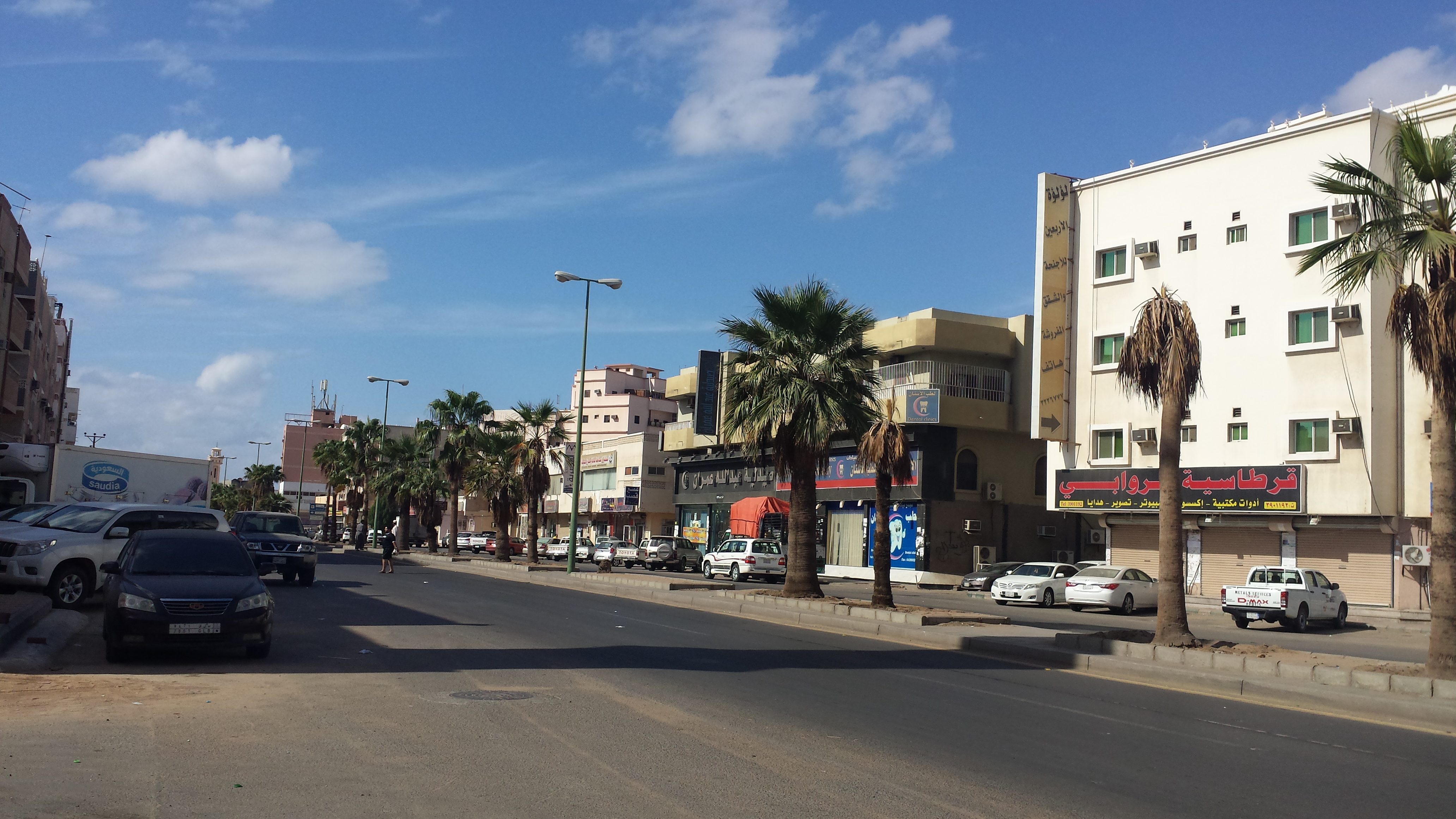 Al Zuhur, Yanbu 46424, Saudi Arabia